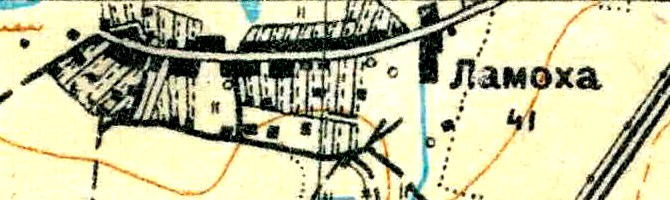 Топографическая карта Ленинградской области, квадрат О-35-23-А-а (Большая Систа), деревня Ломаха.